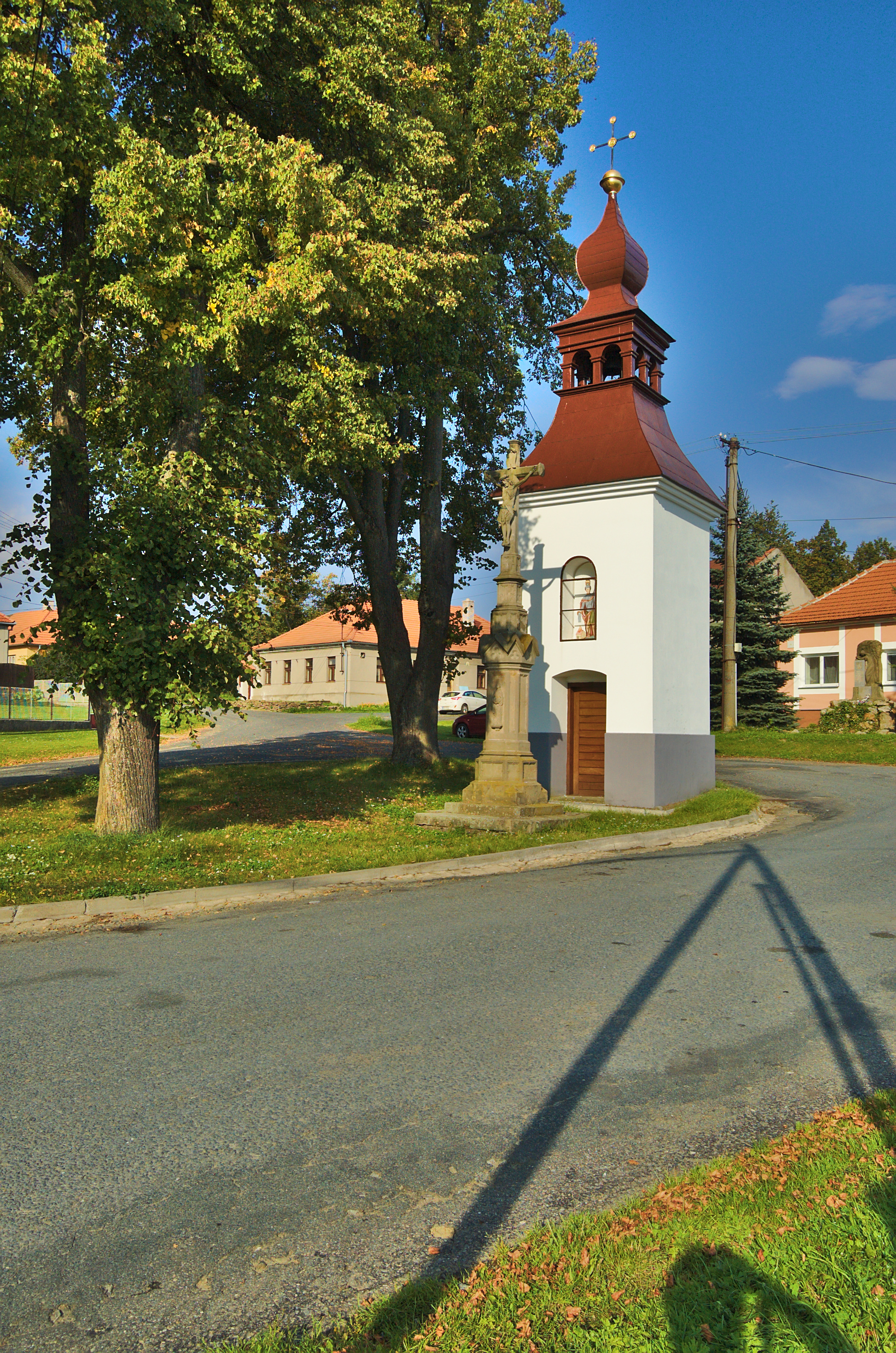 Zvonice na návsi, Nové Sady, okres Vyškov